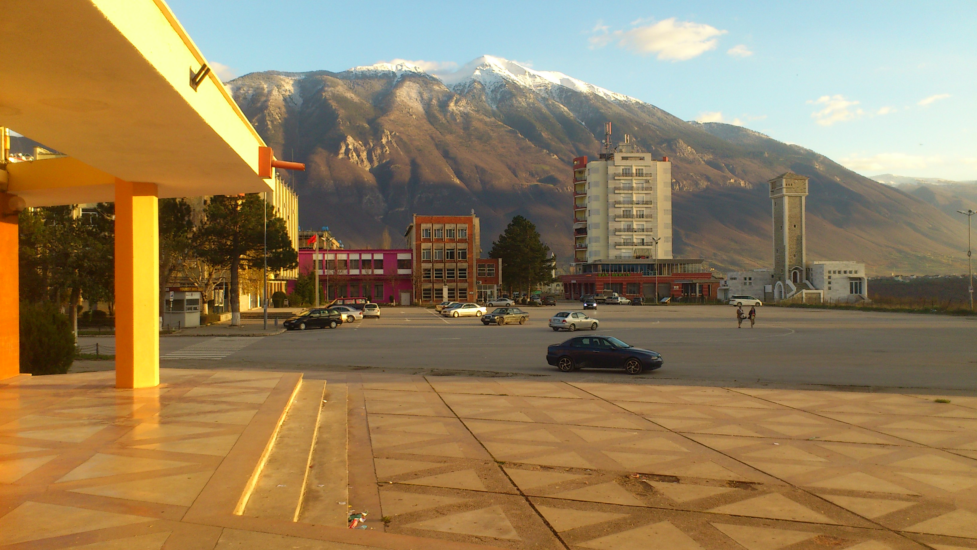 Pamje e Sheshit "Skenderbej"